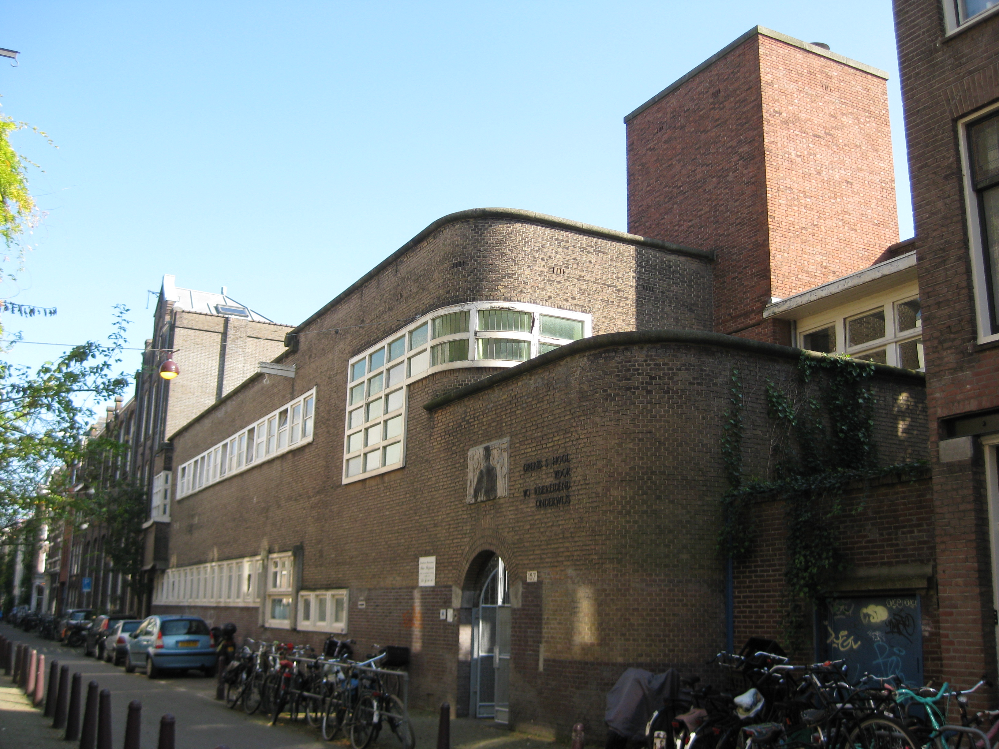 Theo Thijssenschool in de Anjeliersstraat in Amsterdam (Jordaan)